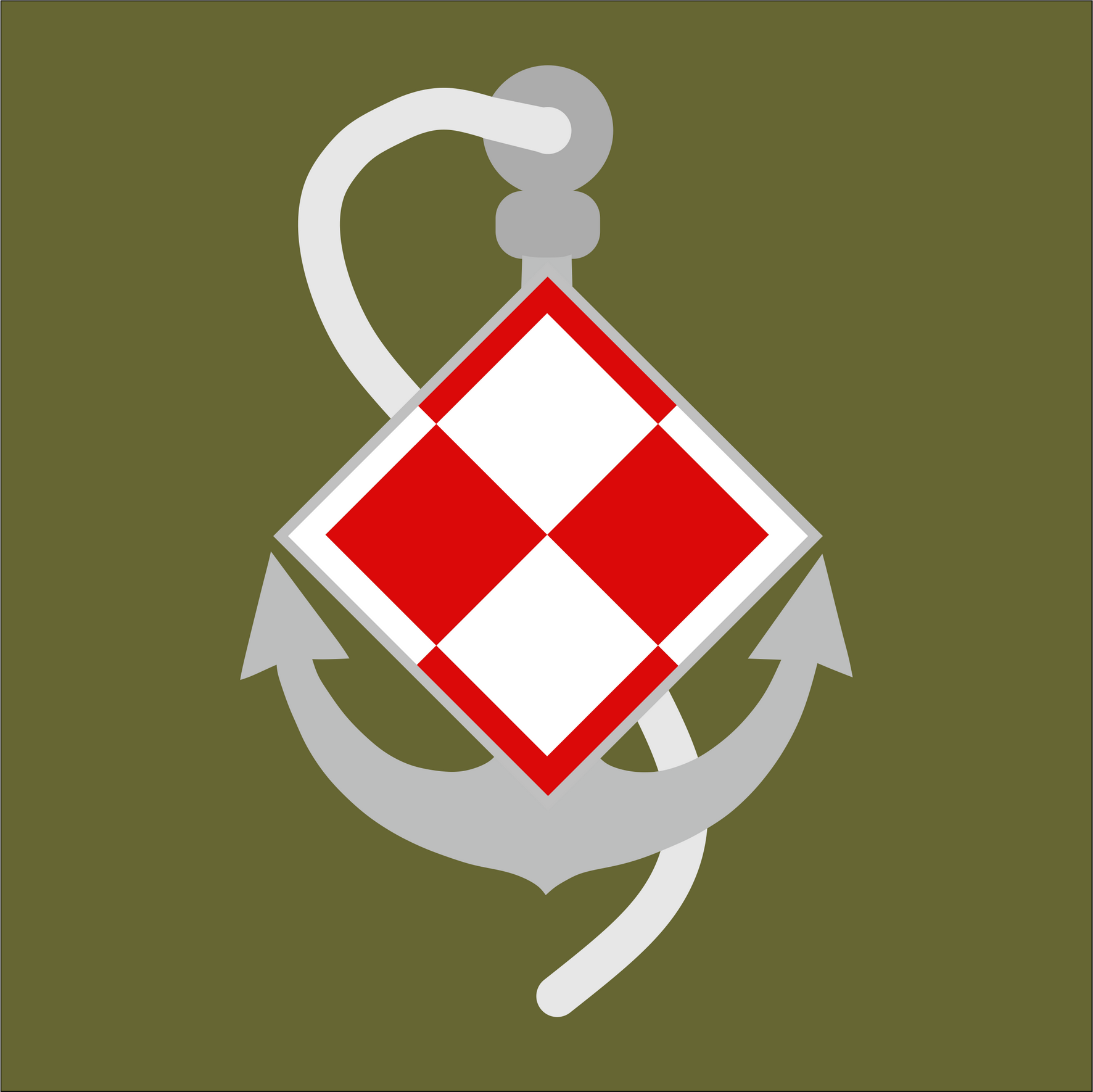 Znak malowany na samolotach rzecznej eskadry lotniczej, stosowany w latach 1927 - 1932